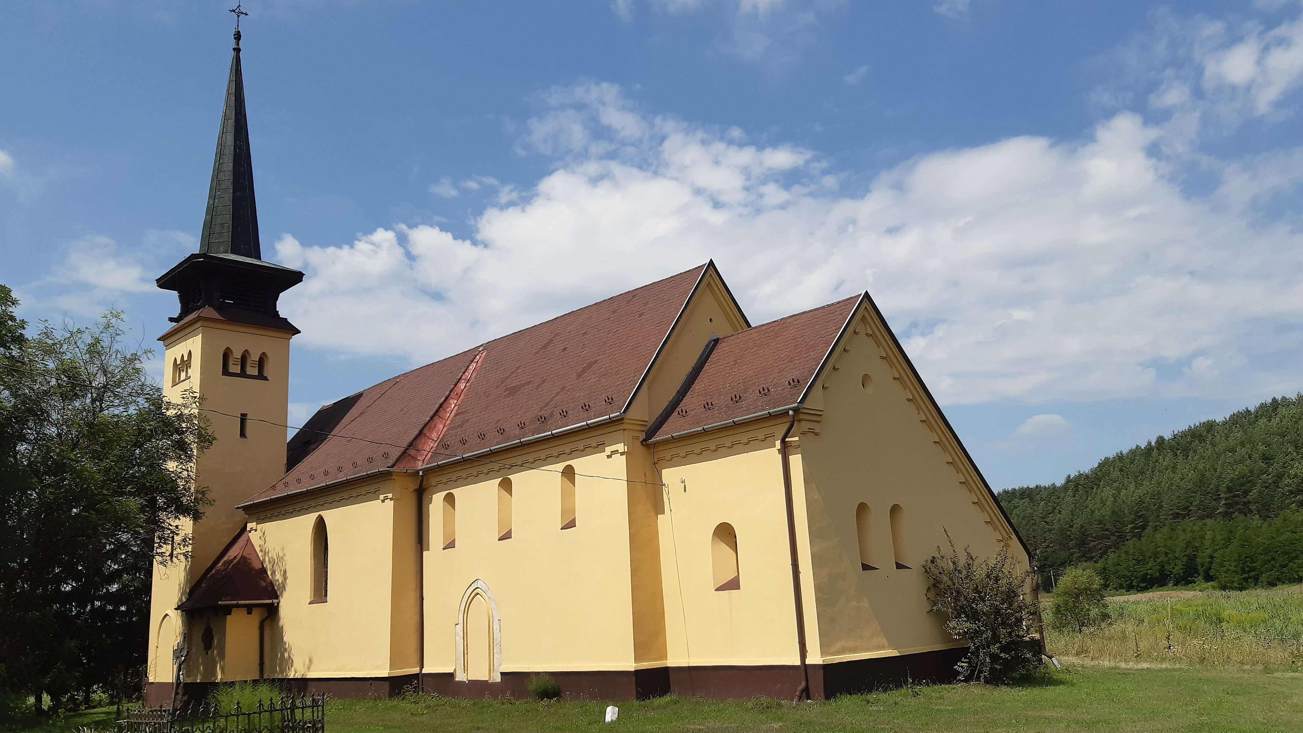 Zabari Magyarok Nagyasszonya római katolikus templom